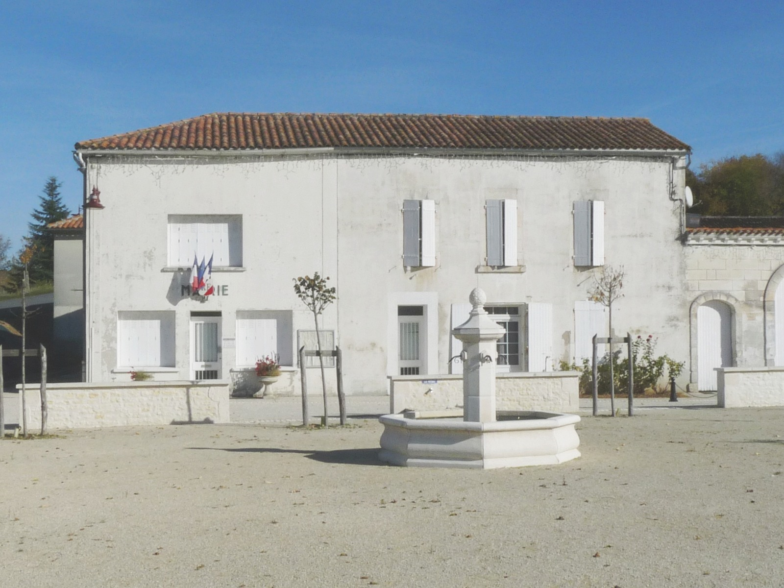 Mairie de Nonaville, Charente, France